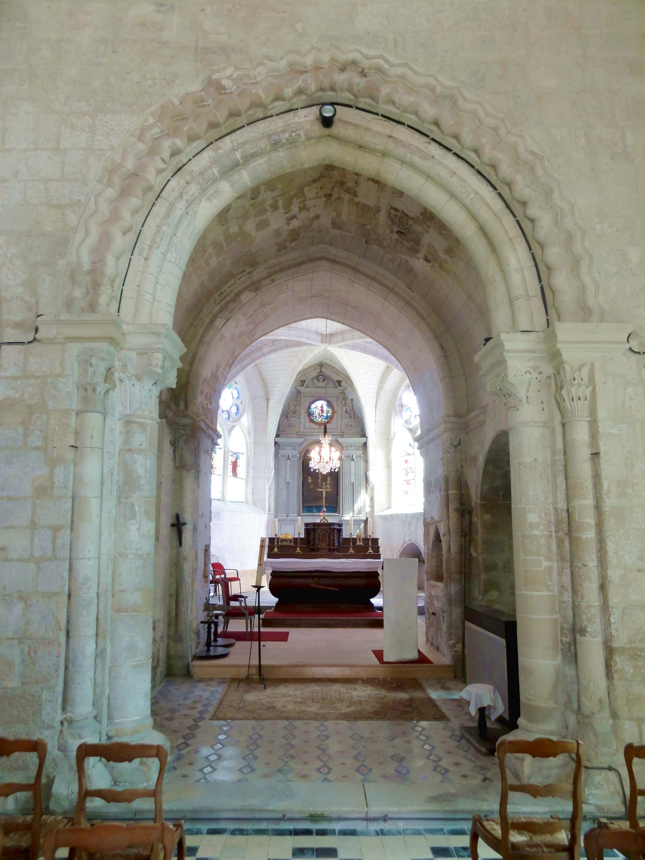 Intérieur de l'église (voir titre).